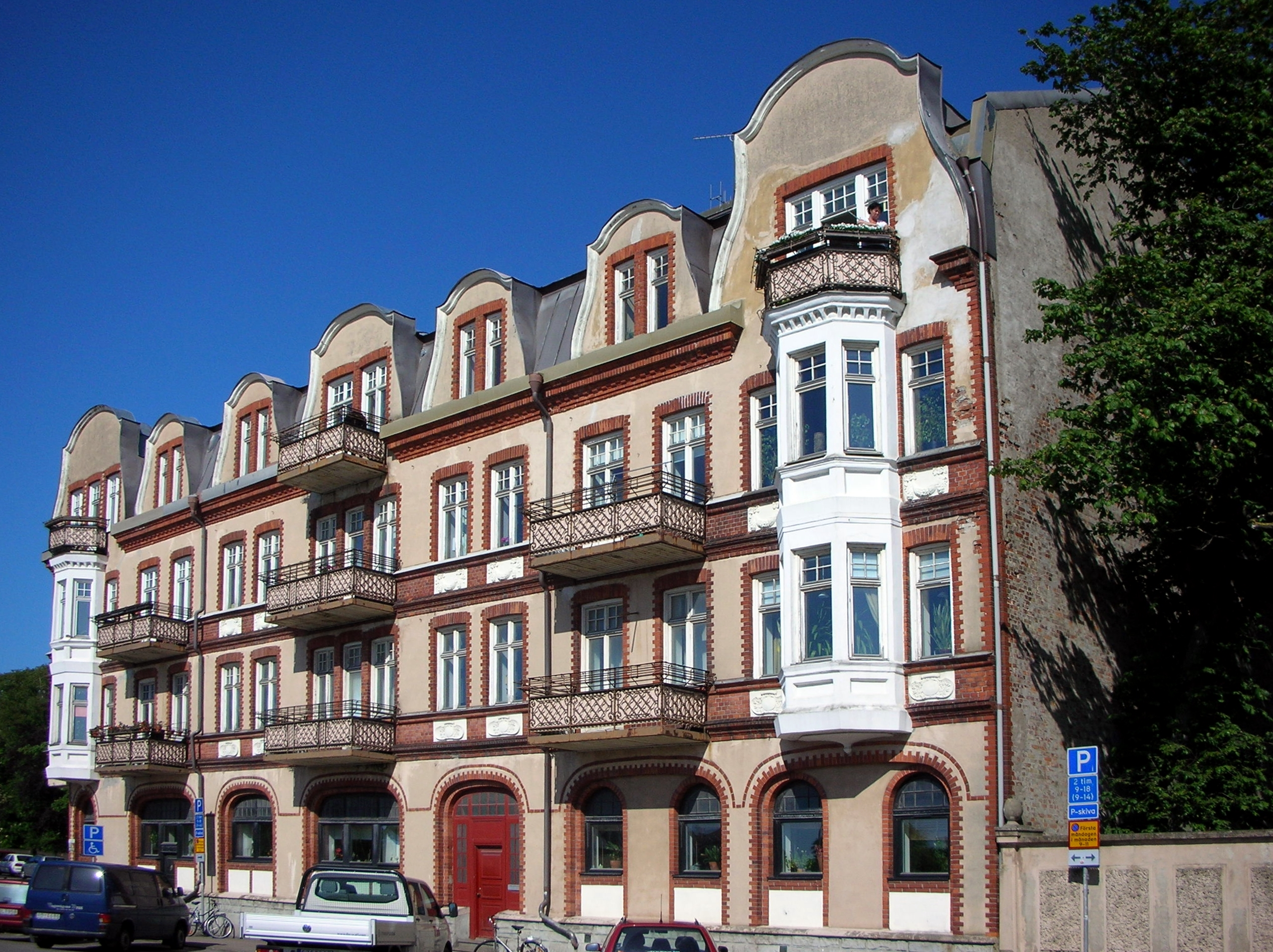 Ternellska huset, Varberg